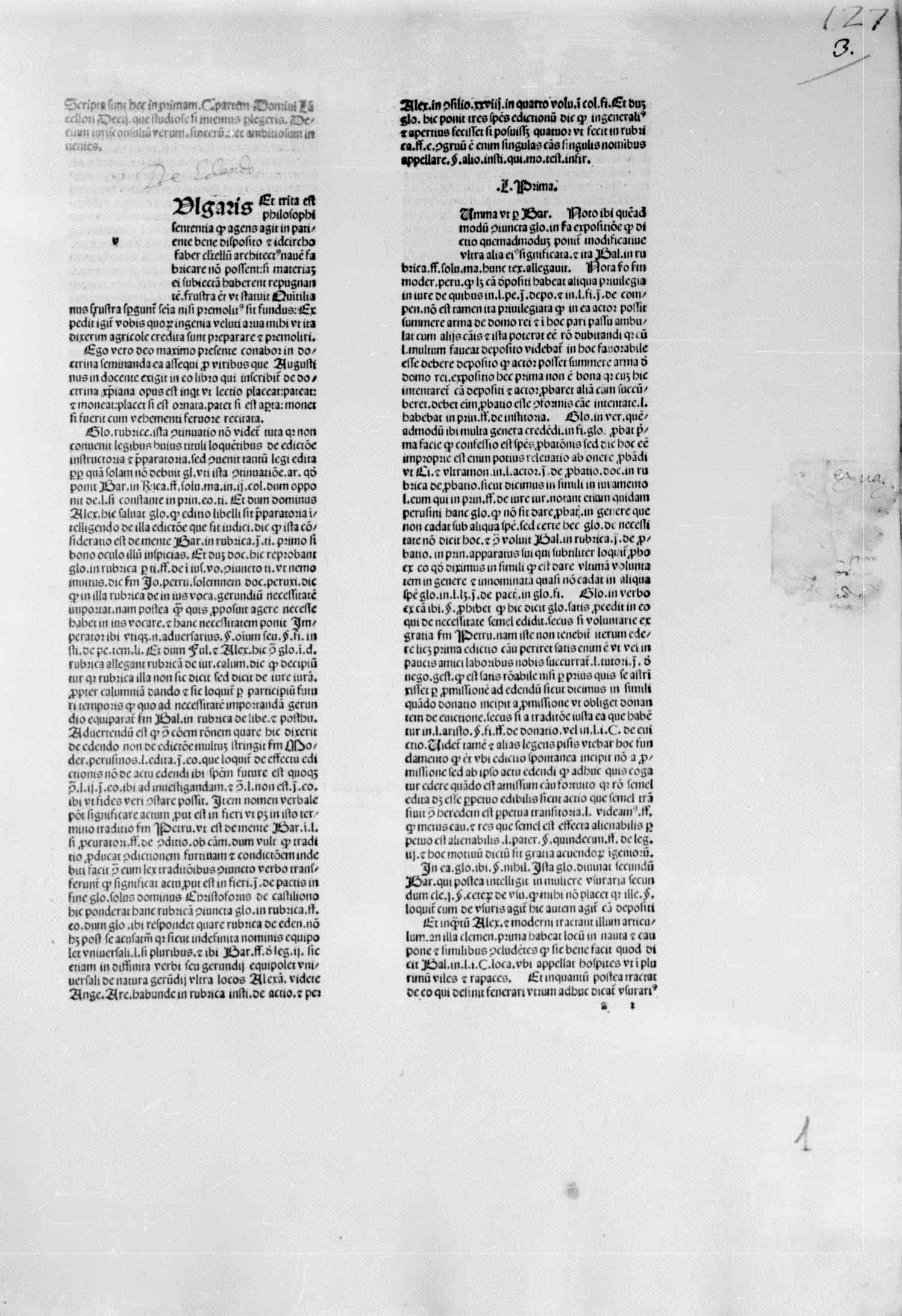 carta a2r